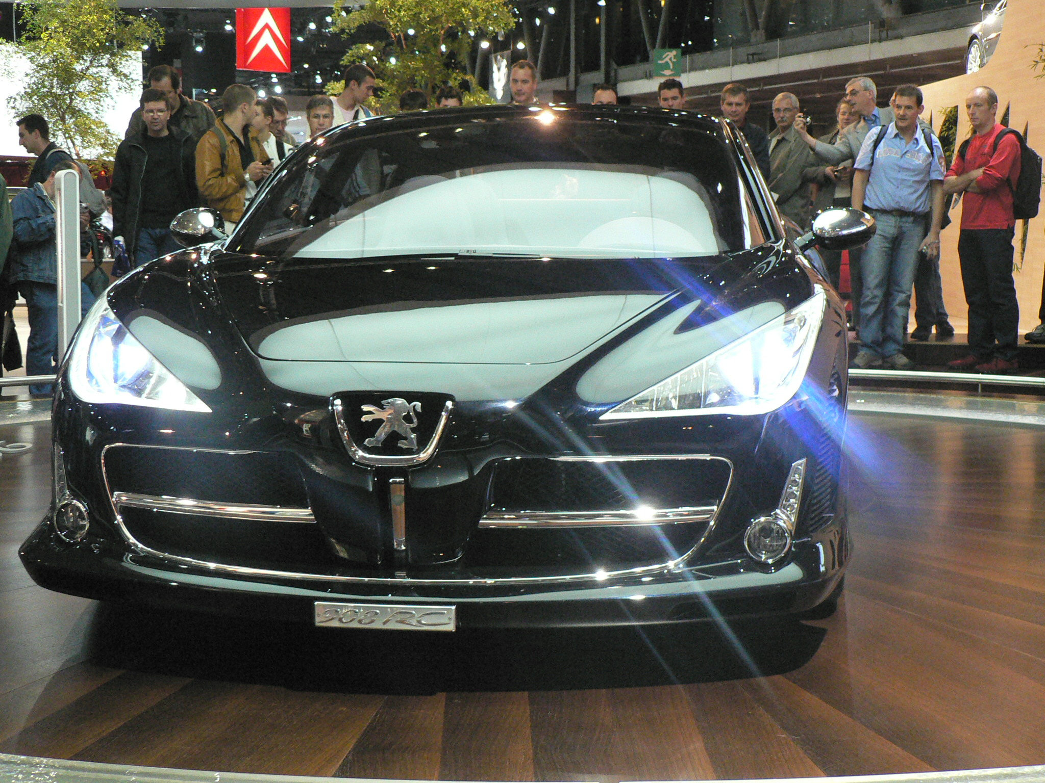 Mondial de l'automobile, Paris 2006